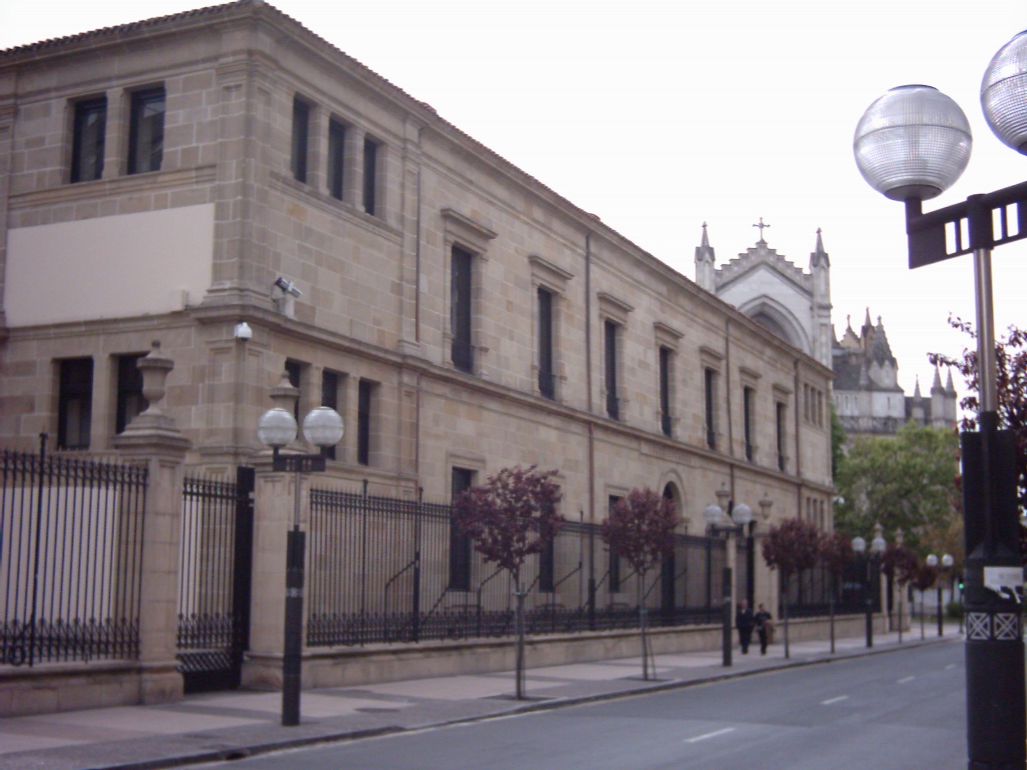 Parlamento Vasco en Vitoria